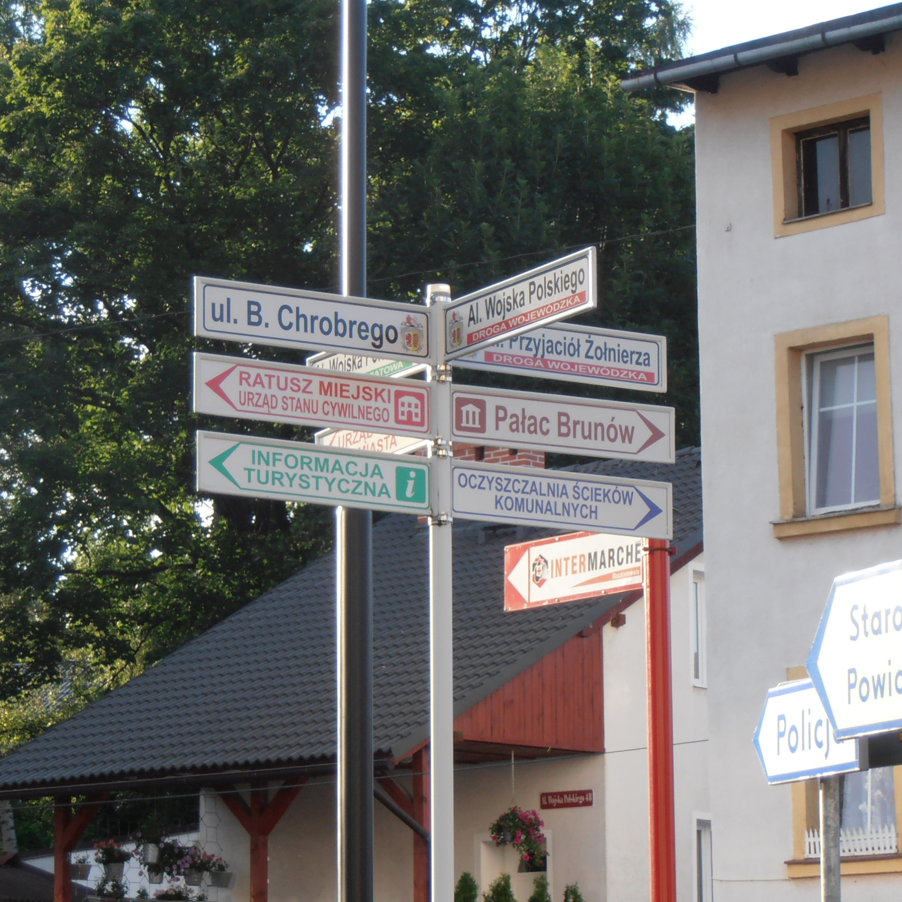 Lwówek Śląski. Drogowskaz miejski.